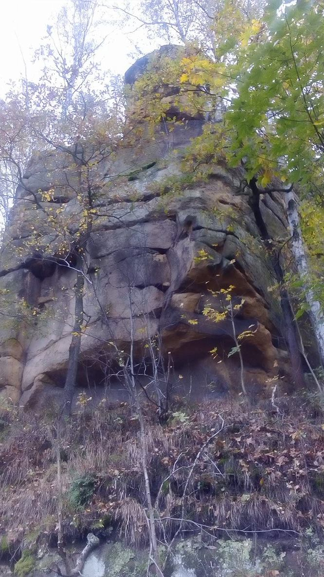 Krucze Skały - formy piaskowcowe